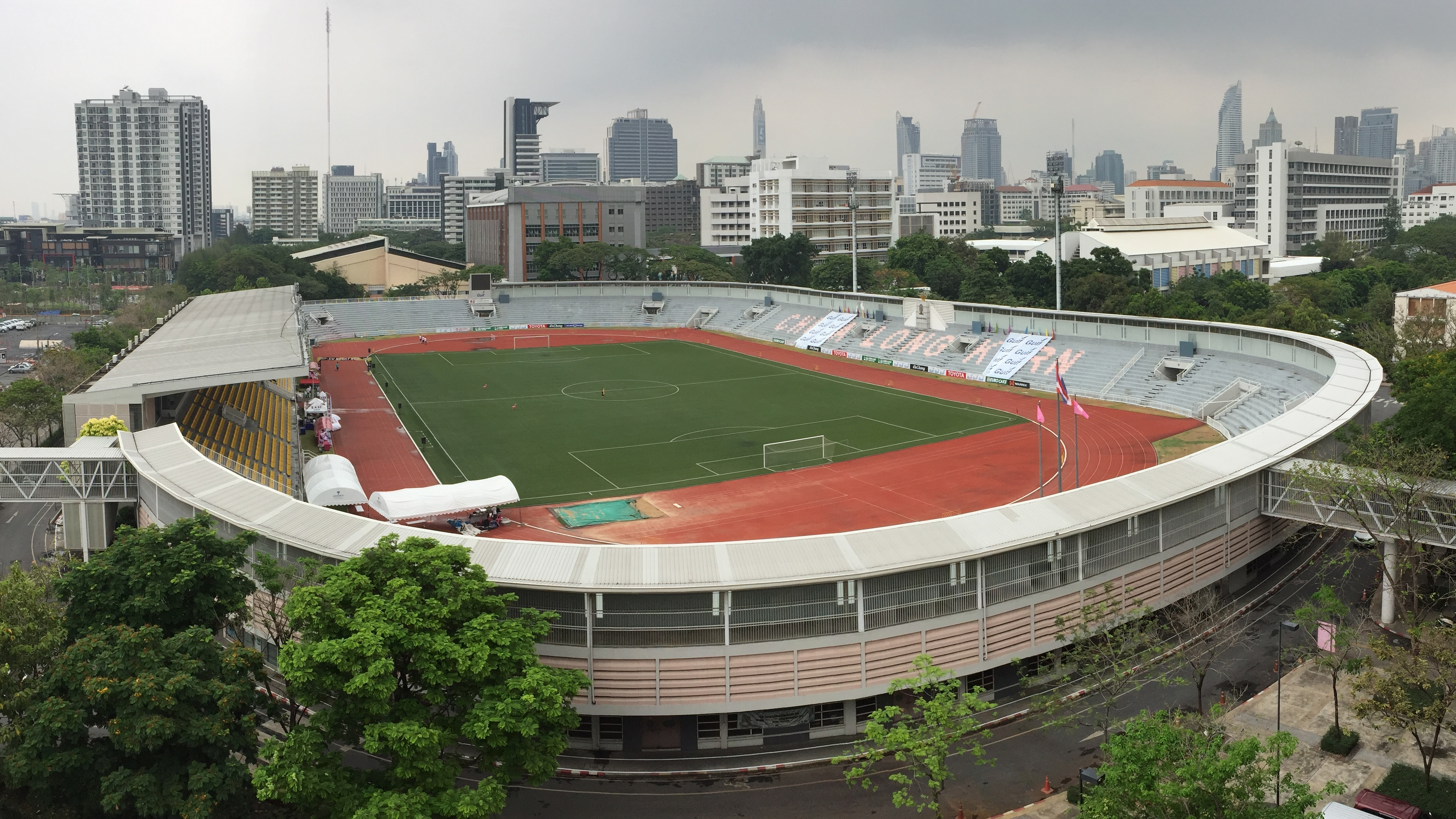 สนามกีฬาจุฬาลงกรณ์มหาวิทยาลัย แวดล้อมด้วยเขตพาณิชกรรมของมหาวิทยาลัย ในปี พ.ศ. 2560